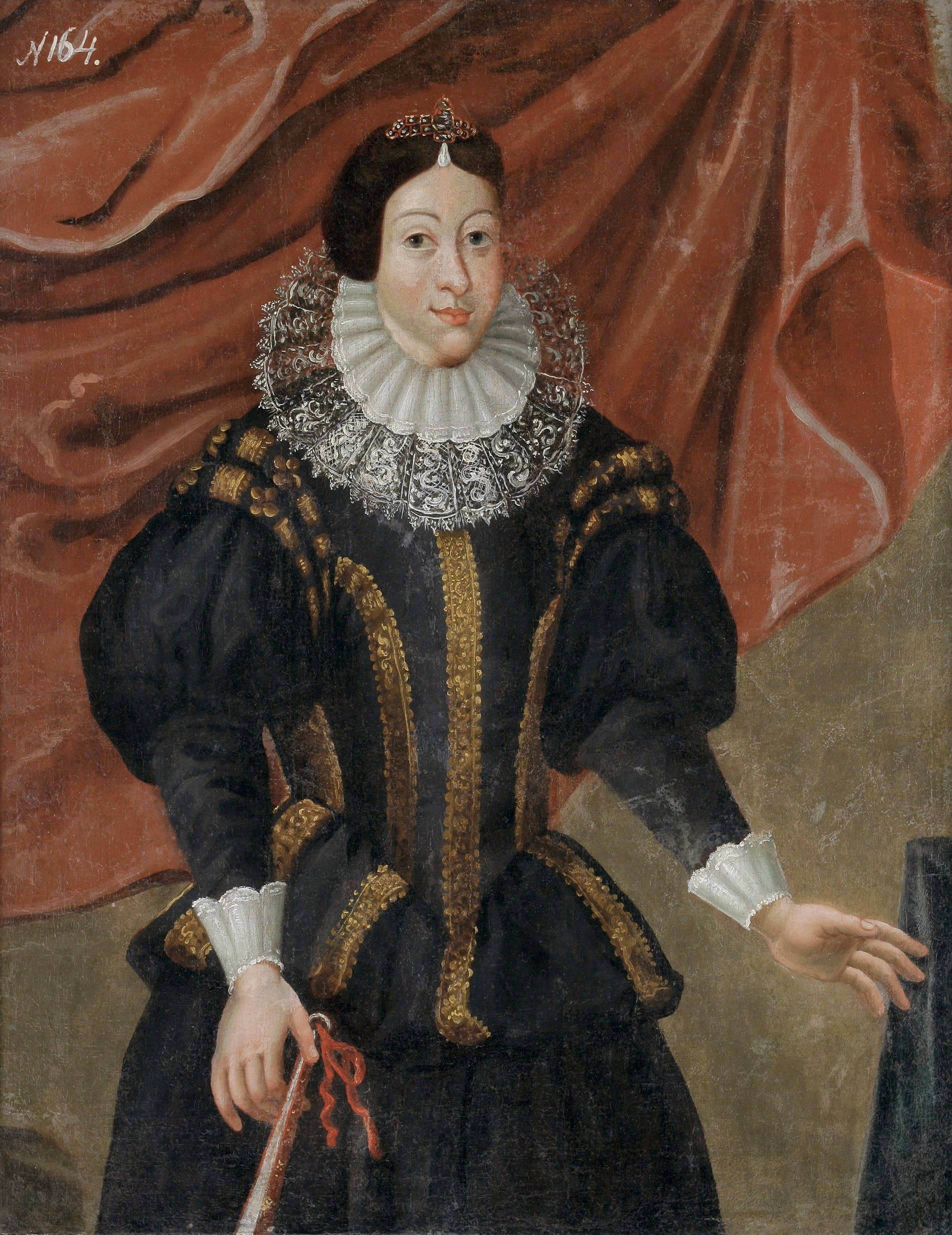 Беларуская (тарашкевіца): Партрэт Аляксандры Радзівіл (Alaksandra Radzivił) з князёў Вішнявецкіх (Višniaviecki)